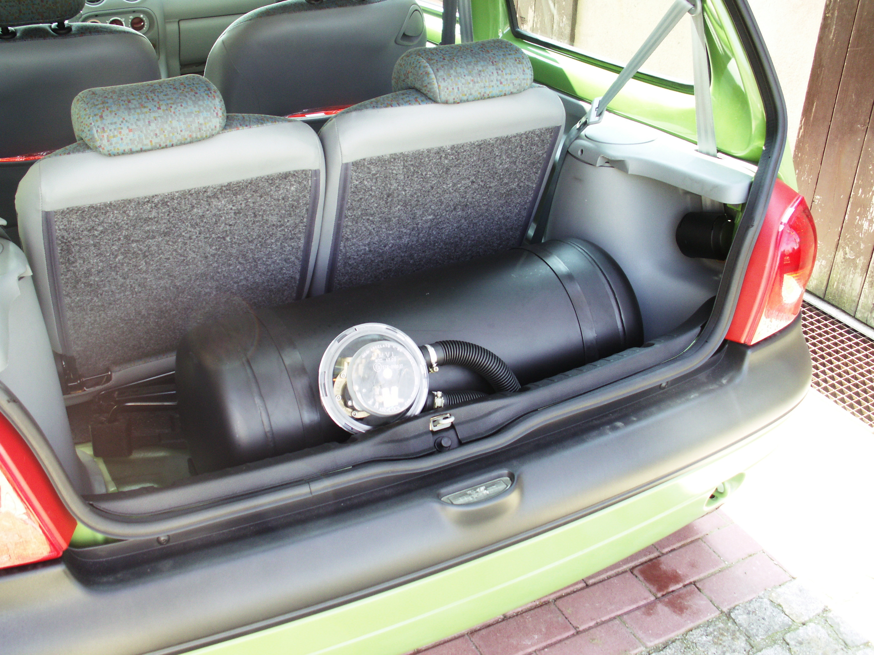 Autogas-Zylindertank in einem Renault Twingo